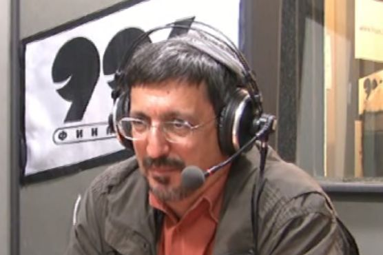 Гасан Гусейнов в эфире Финам ФМ